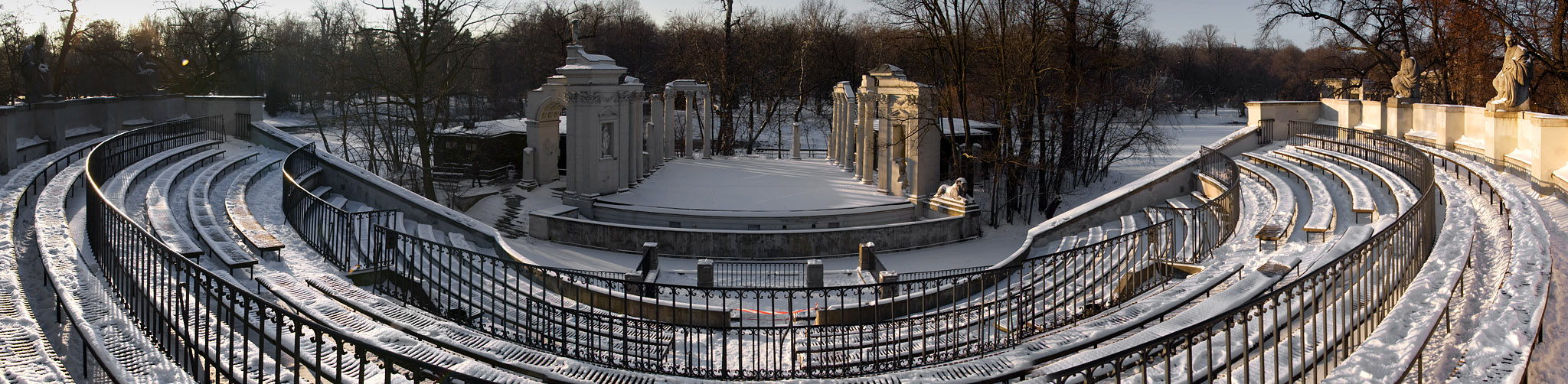 Panorama amfiteatru w warszawskich Łazienkach.